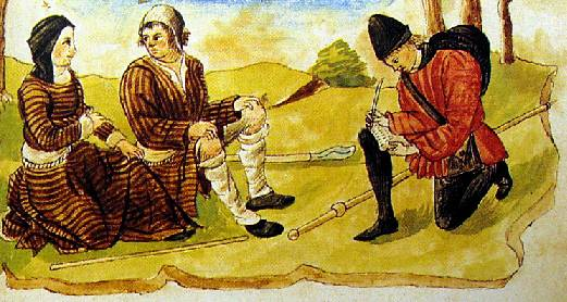 Fragment d'una miniatura del segle XV que representa un pastor i una pastora que discuteixen sobre quin amor és més gran, el de l'home o el de la dona, mentre un escriptor apunta el que diuen. Del manuscrit "Regnault i Jeanneton". Extret de amb l'autorització de Miquel Alonso.